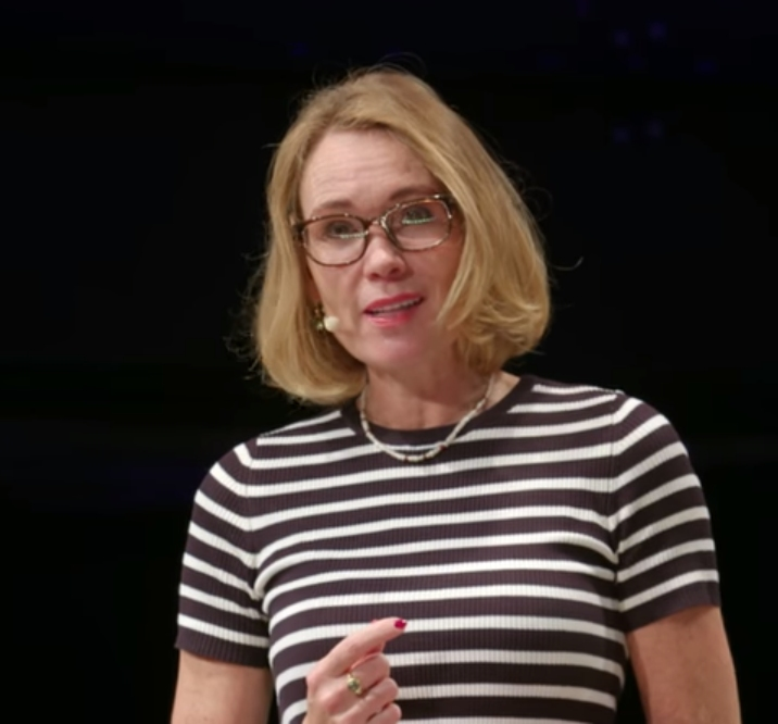 Je hoort of voelt je telefoon trillen, maar als je ernaar kijkt heeft er helemaal niemand gebeld. Herkenbaar? Het horen, voelen of zien van dingen die er niet zijn, komt bij iedereen voor. Prof. dr. Iris Sommer vertelt je hoe dit in je hersenen werkt en wanneer je je eigen oren en ogen wél of níet kunt geloven. Deze week in Universiteit van Nederland: prof dr. Iris Sommer Psychiater Iris Sommer (UU) is als hoogleraar psychiatrie gespecialiseerd in schizofrenie. Met haar boek ‘Haperende hersenen’ leverde ze belangrijke inzichten over de behandeling van mensen met een hersenaandoening. Verder weet ze alles over stemmen in hoofden, en daar kan ze ontzettend bevlogen over vertellen.